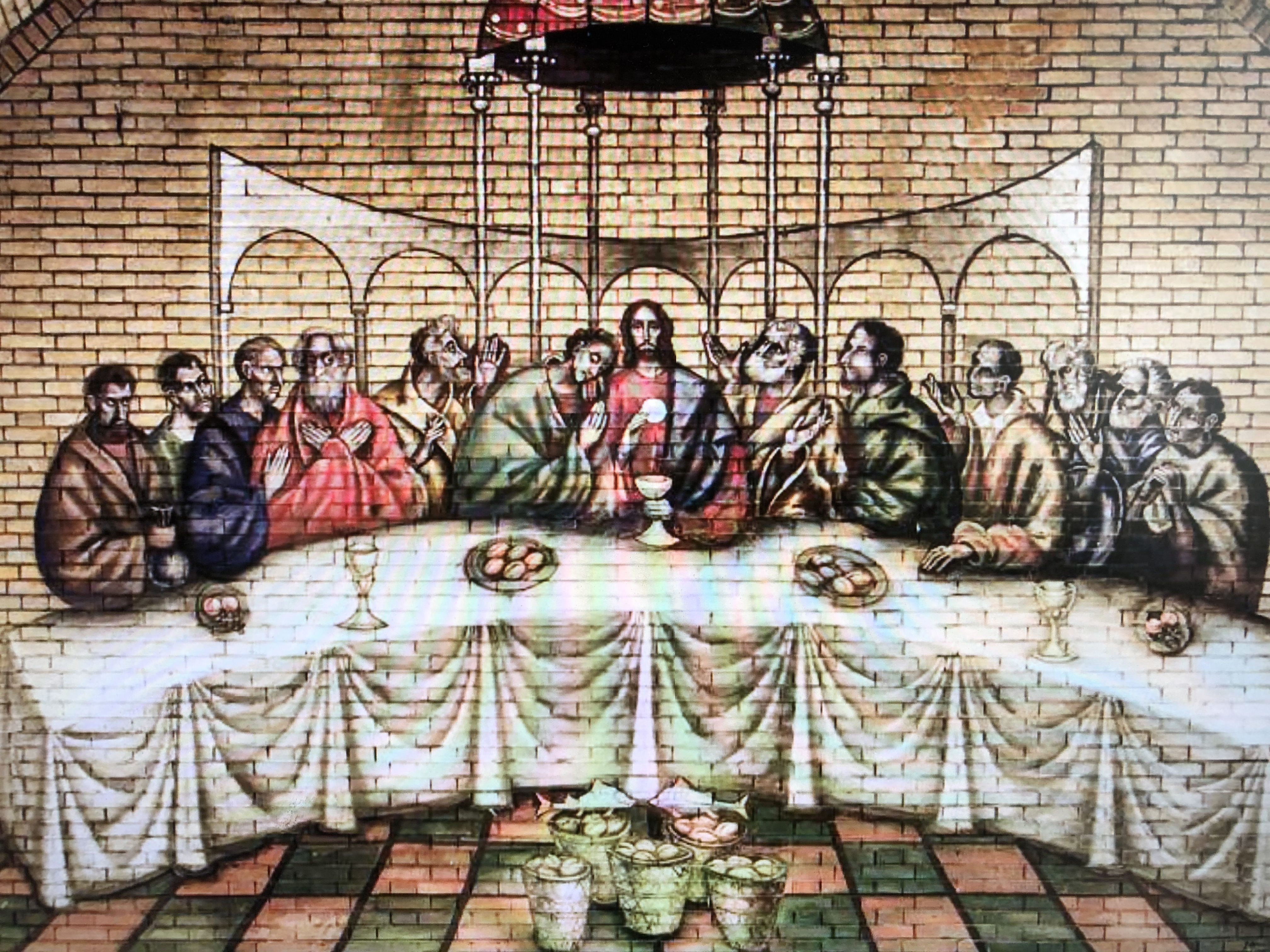 muurschildering boven altaar kerk Steenwijksmoer